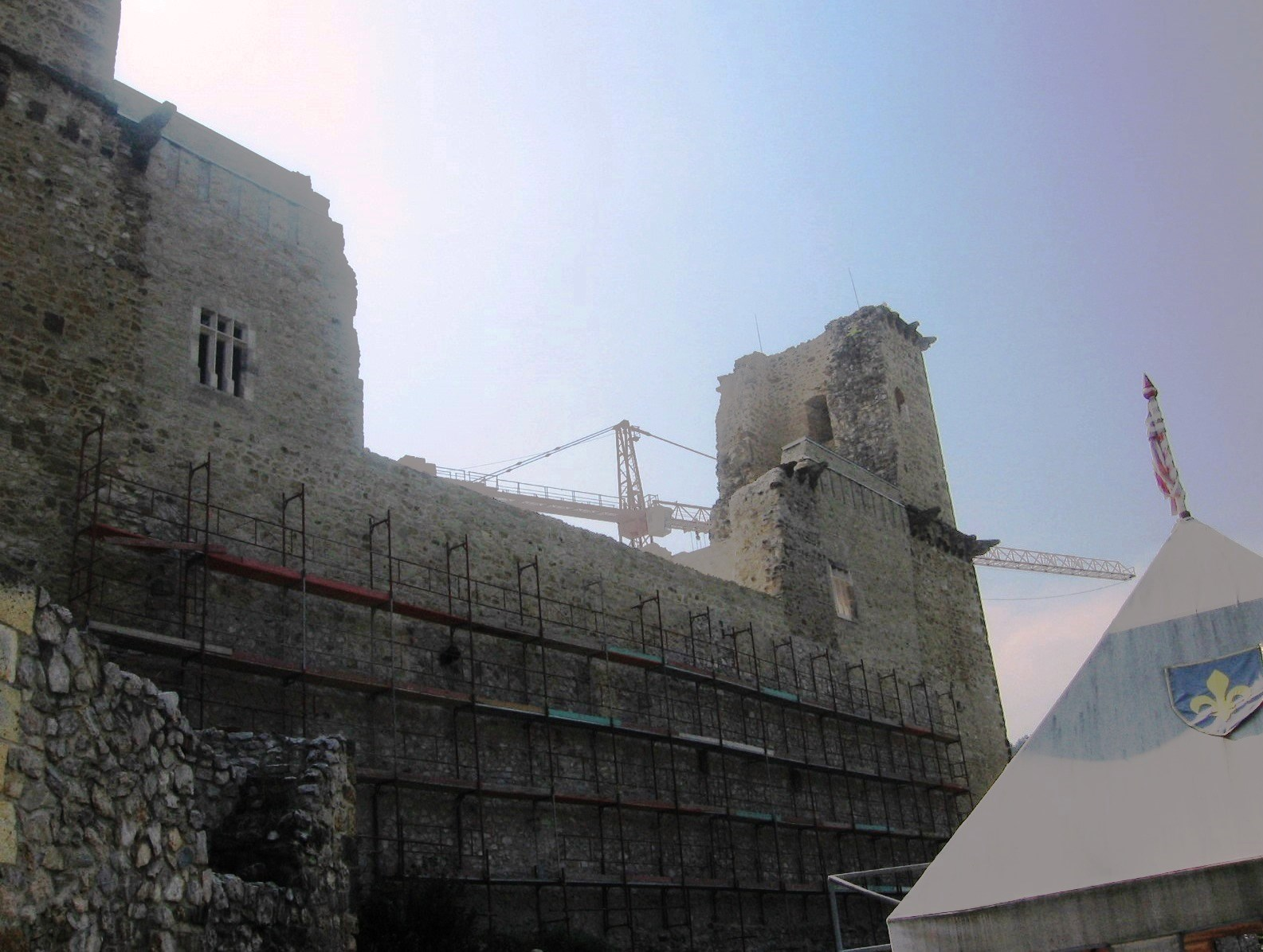 Ezt a falat teljesen vissza fogják építeni